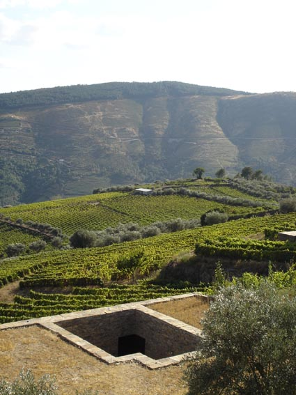 Casa Provesende Vista Cobertura Poente